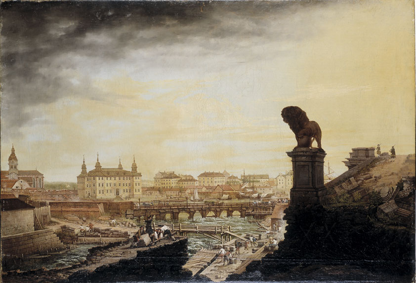 Utsikt från nuv. Mynttorget över Slaktarhusbron, Blasieholmen och Lejonbacken i Stockholm